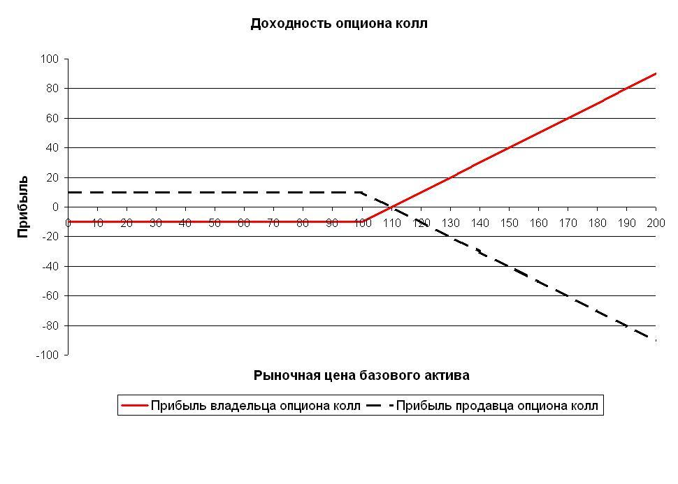 График зависимости доходности опциона для продавца и покупателя опциона от изменения рыночной цены базового актива